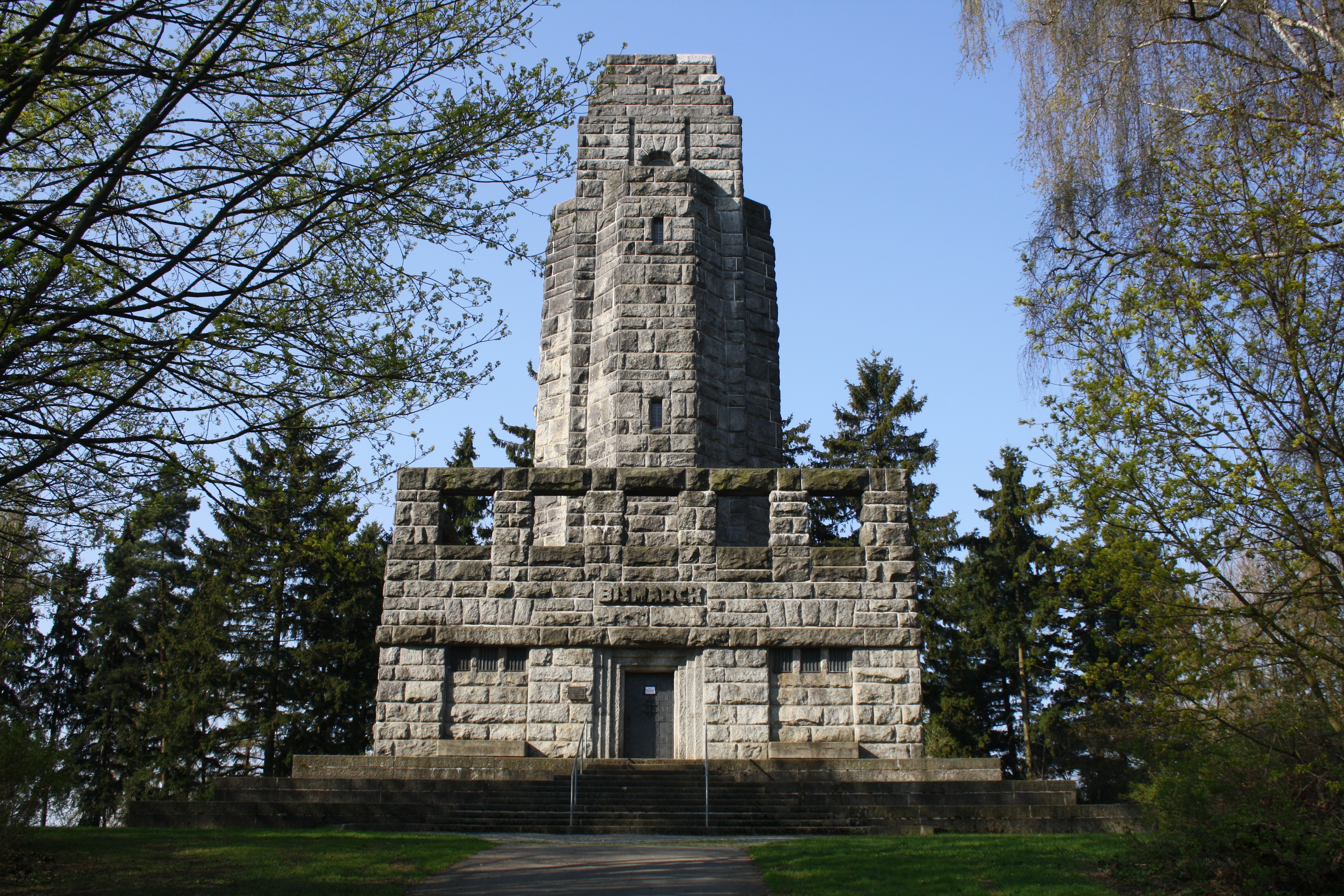 Denkmal "Bismarkturm in Hof"